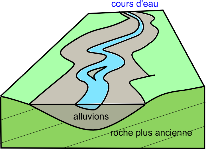 Croquis structural d'alluvions